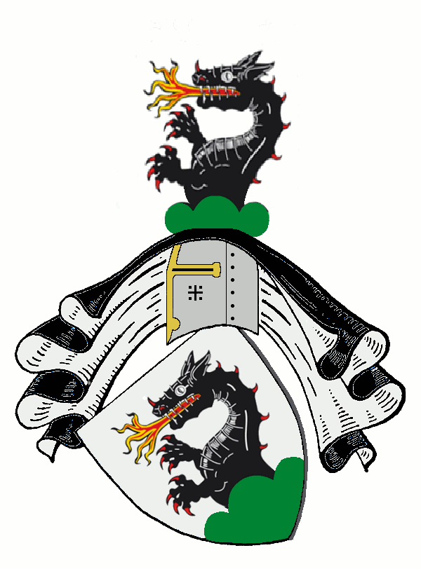 Wappen derer von Steinhilben